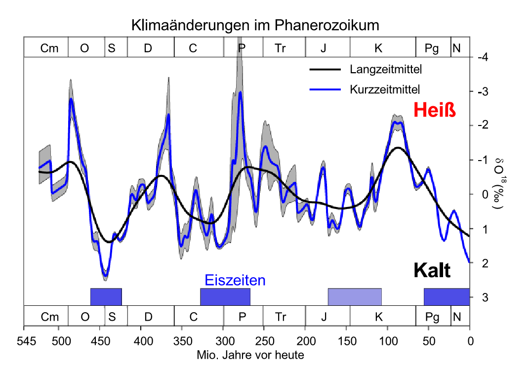 Klimaänderungen im Phanerozoikum anhand von Isotopendaten. Erläuterung siehe Original-Beschreibungsseite (en.)